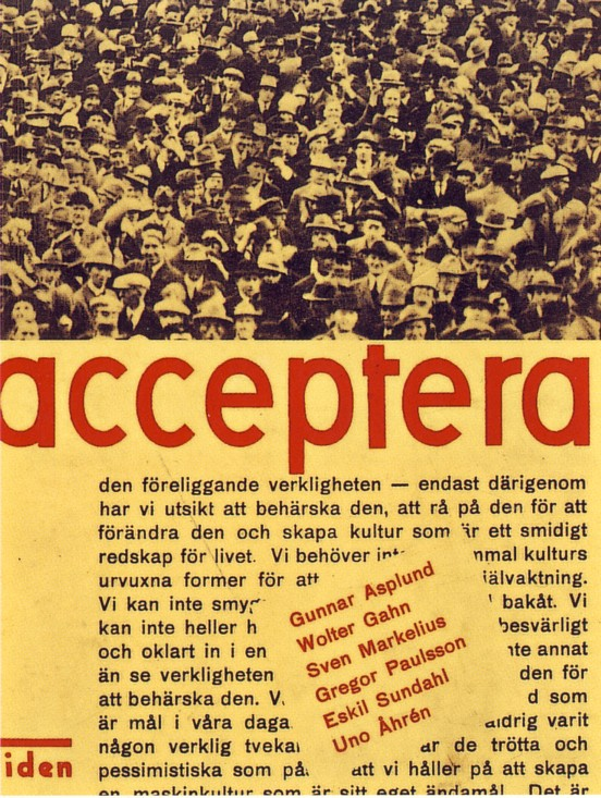 boktitel till den svenska arkitektur-debattboken "acceptera" 1931